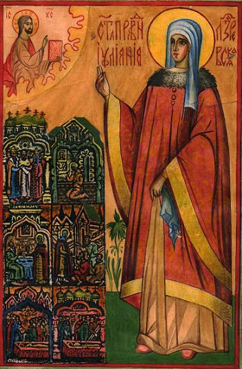 Репродукция иконы святой праведной Иулиании Лазаревской